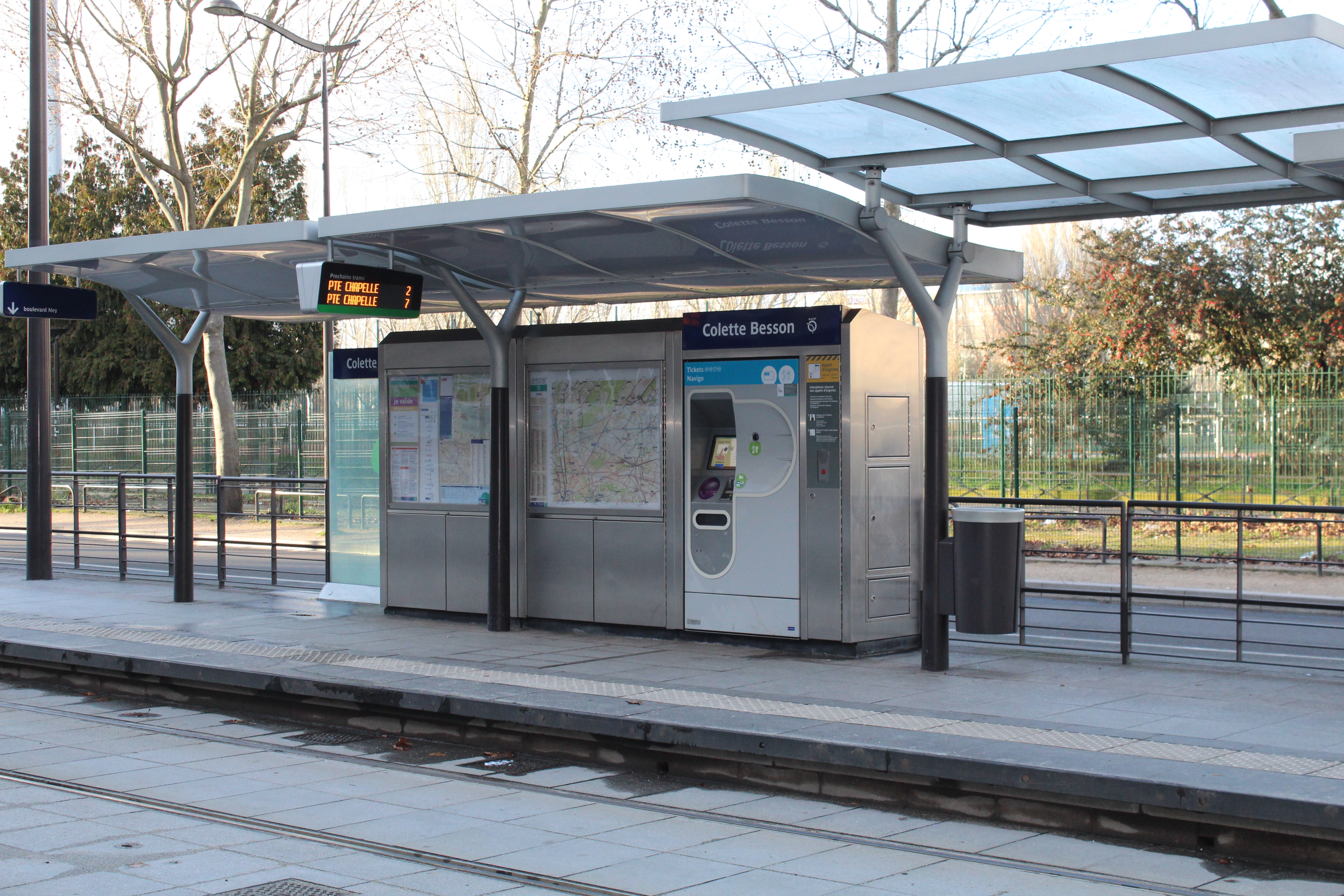 Station de tramway Colette Besson sur la ligne 3b du tramway d'Île-de-France.